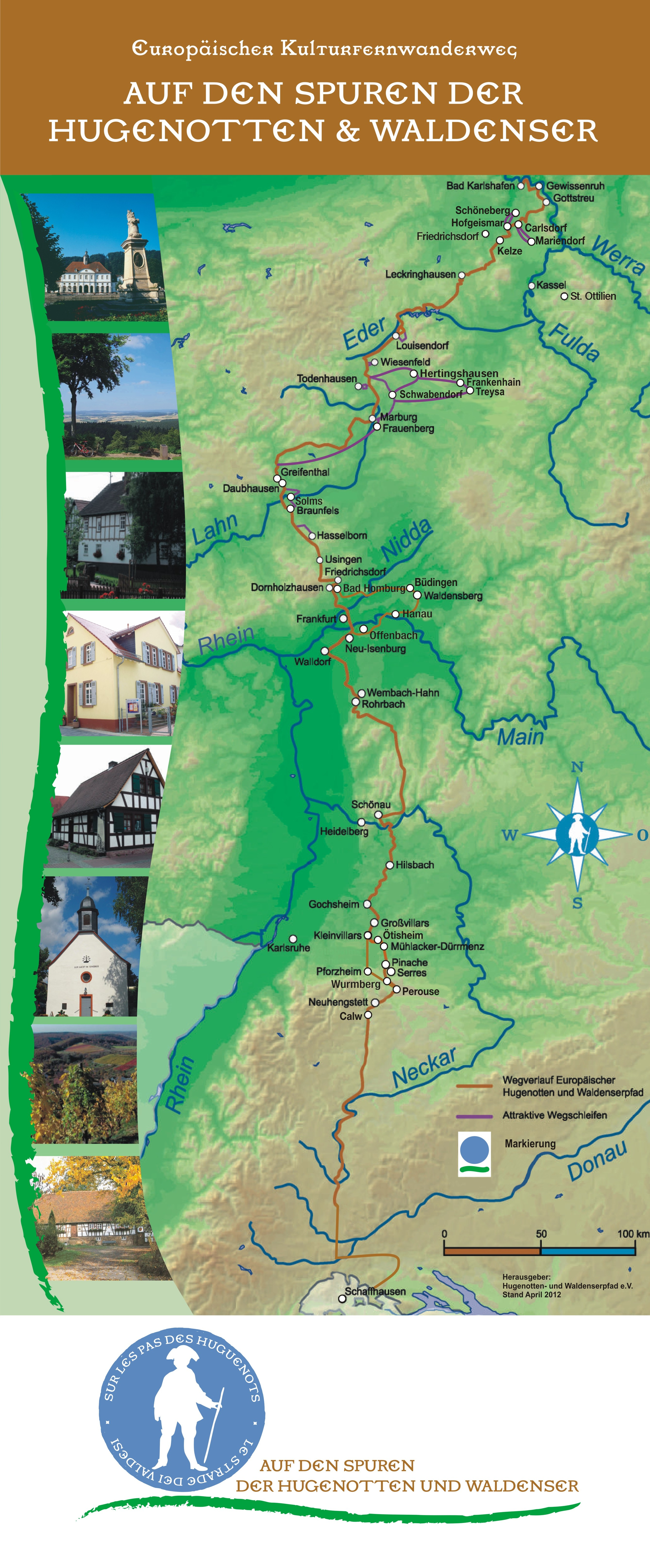 Deutsche Wegstrecke